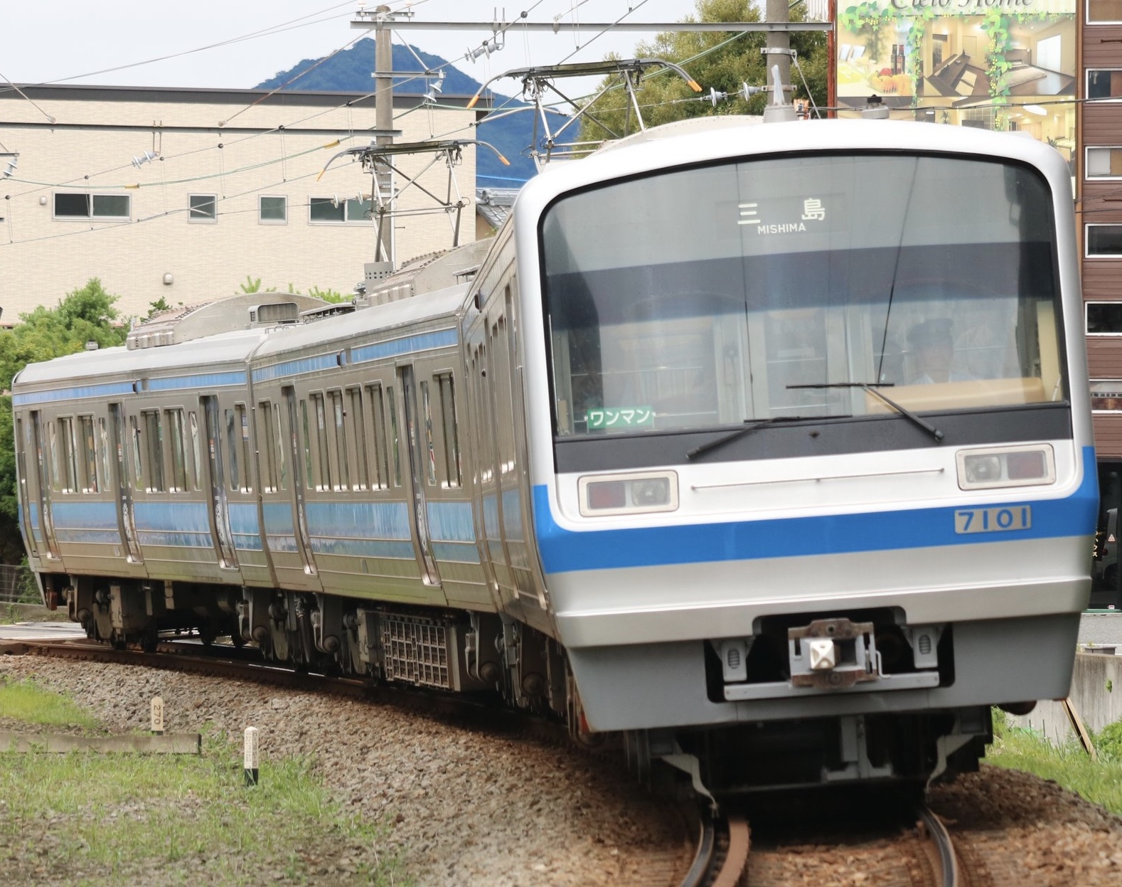 伊豆箱根鉄道7000系7501F 伊豆箱根鉄道駿豆線三島-三島広小路